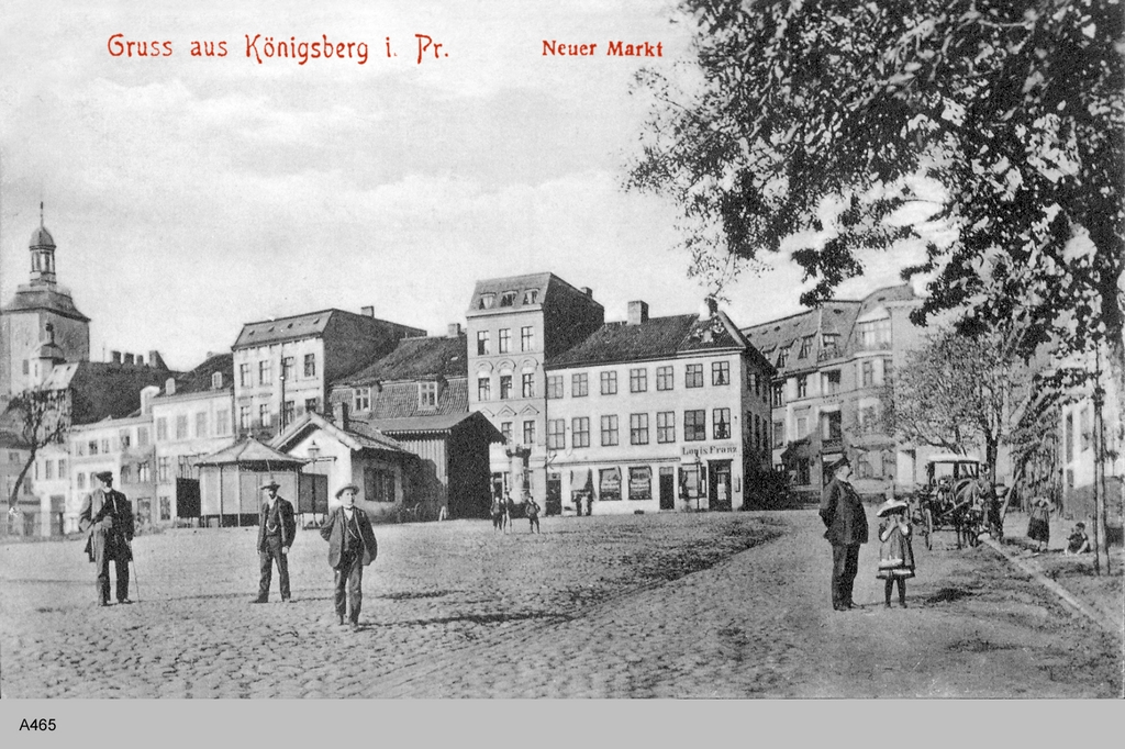 Der Neue Markt in Königsberg Hintergrund die Löbenichsche Kirche